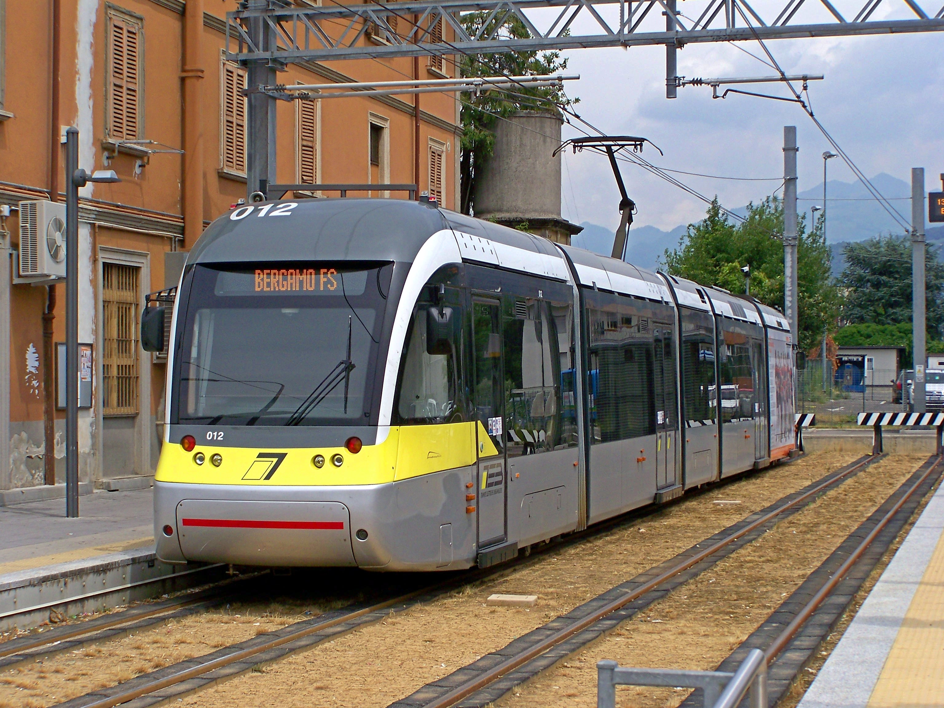 L'AnsaldoBreda Sirio TEB 012 in sosta presso il primo binario della stazione di Albino in attesa di ripartire alla volta di Bergamo FS